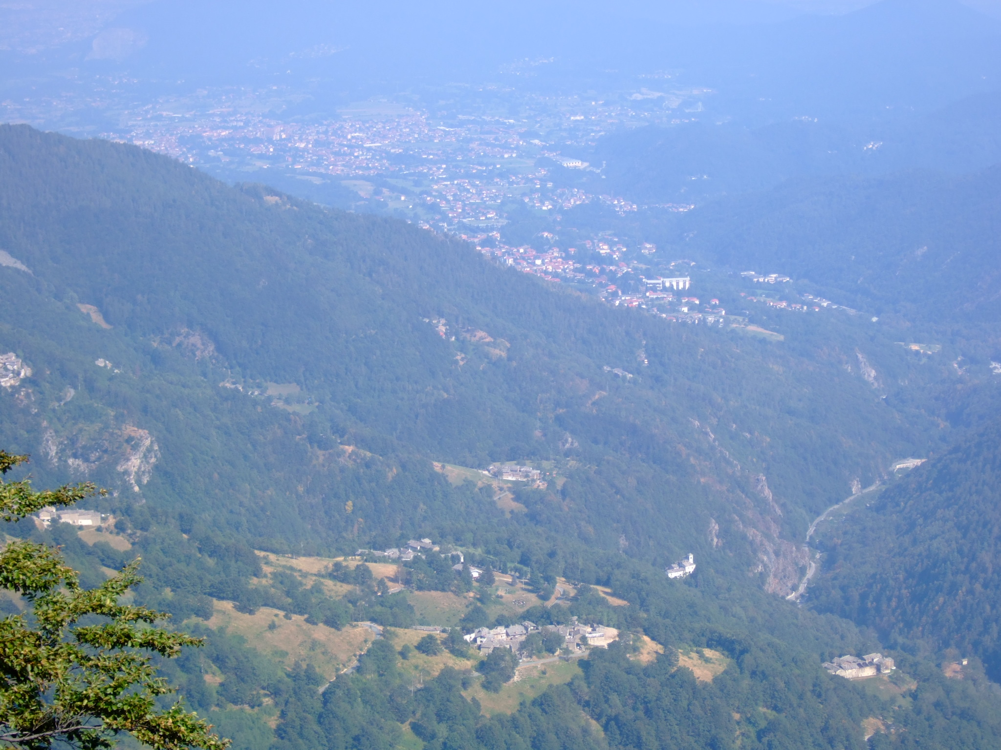 Coazze depuis le secteur de la Punta dé Loson